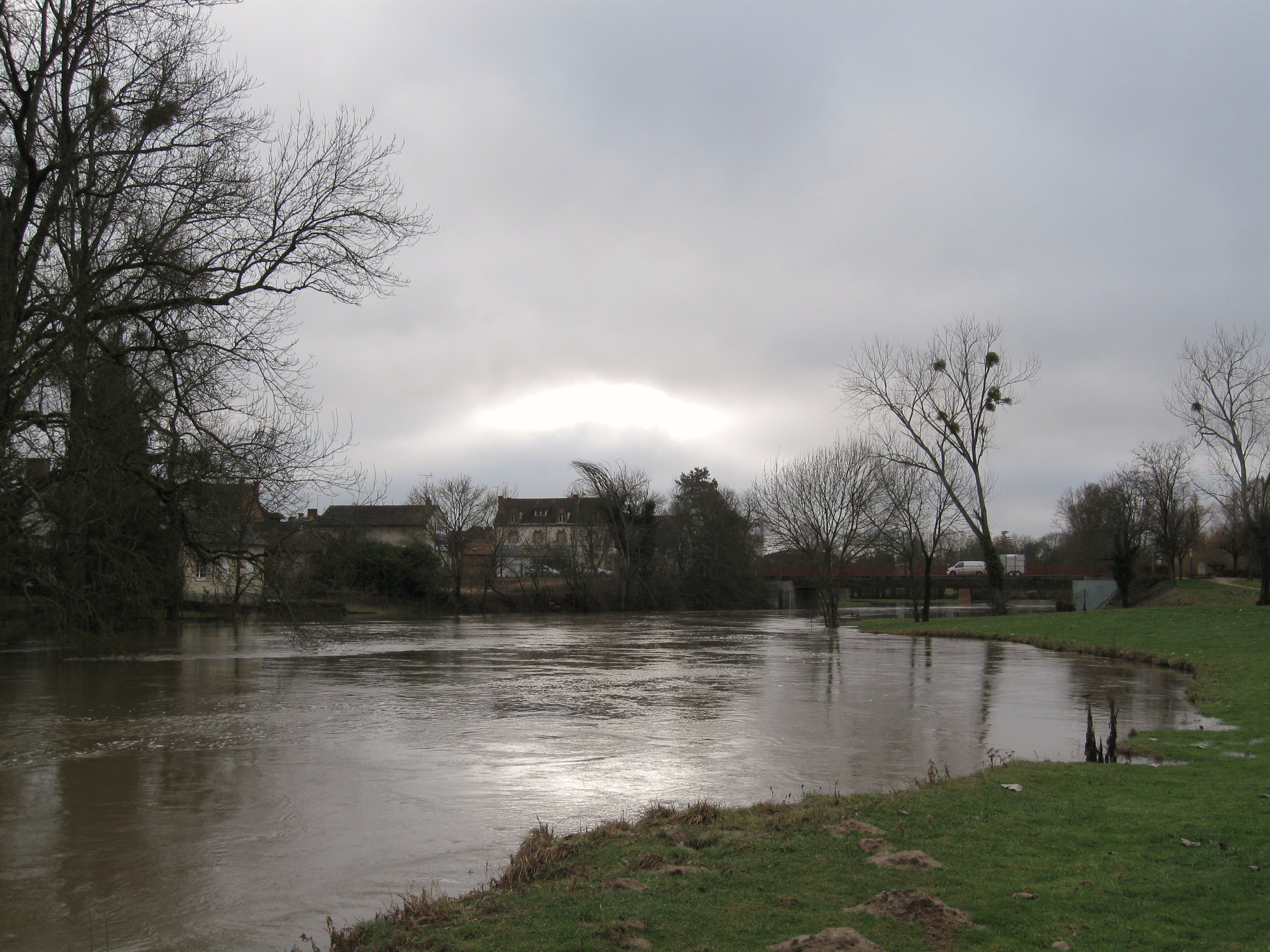 La Sauldre en crue, Salbris, Loir-et-Cher, France